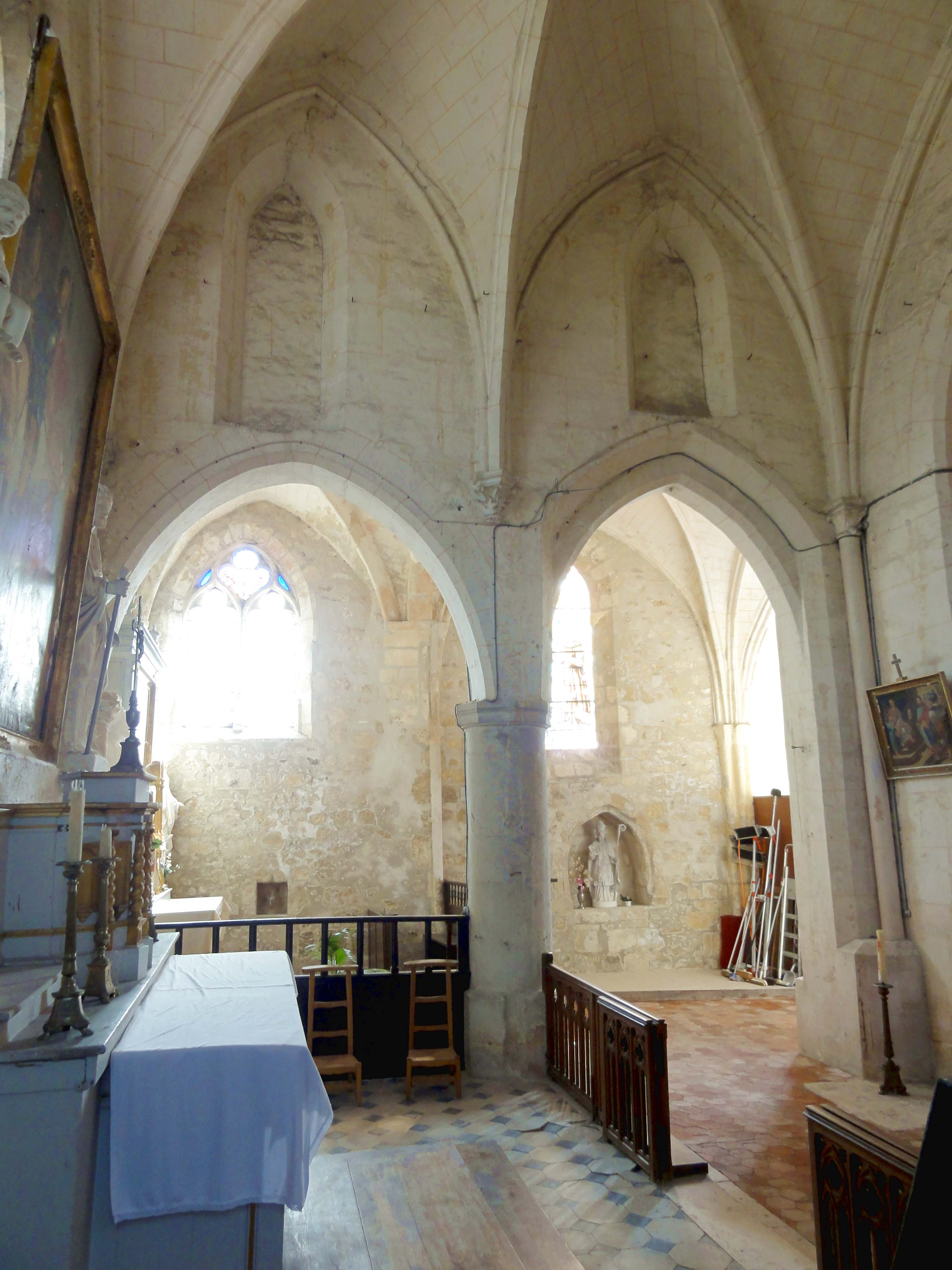 Intérieur de l'église - voir titre.